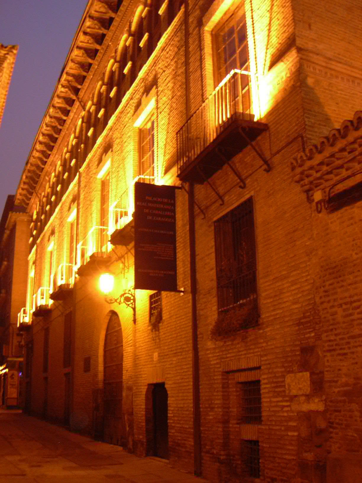 Casa de Miguel Donlope en Zaragoza Casa-palacio renacentista con techumbres mudéjares. Actualmente sede de la Real Maestranza de Caballería de Zaragoza. Fachada del edificio